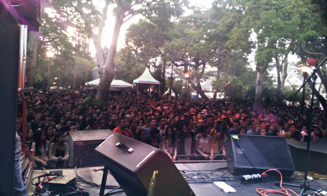 Concierto en el Transitarte en 2014.